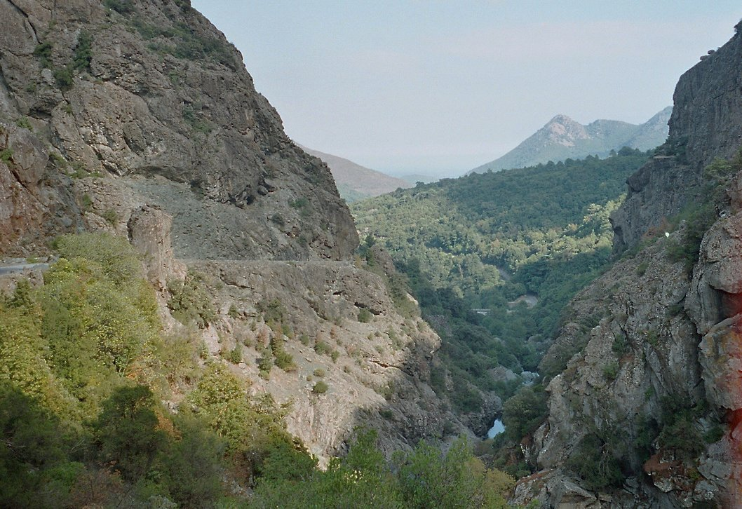 Le défilé de l'Inzecca sur le fleuve Fiumorbo, en Haute-Corse